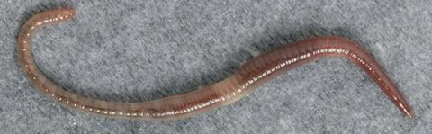 Dendrobaena octaedra, ver de terre des forêts qui vit à la surface du sol, parmi les feuilles mortes qui composent la litière.